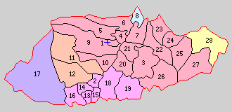 福島県安達郡の町村。